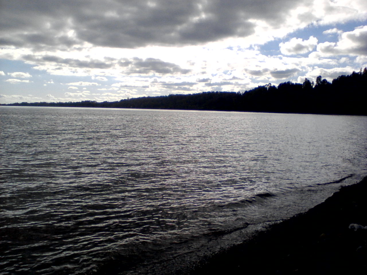 Lago Calafquen y un arco-iris